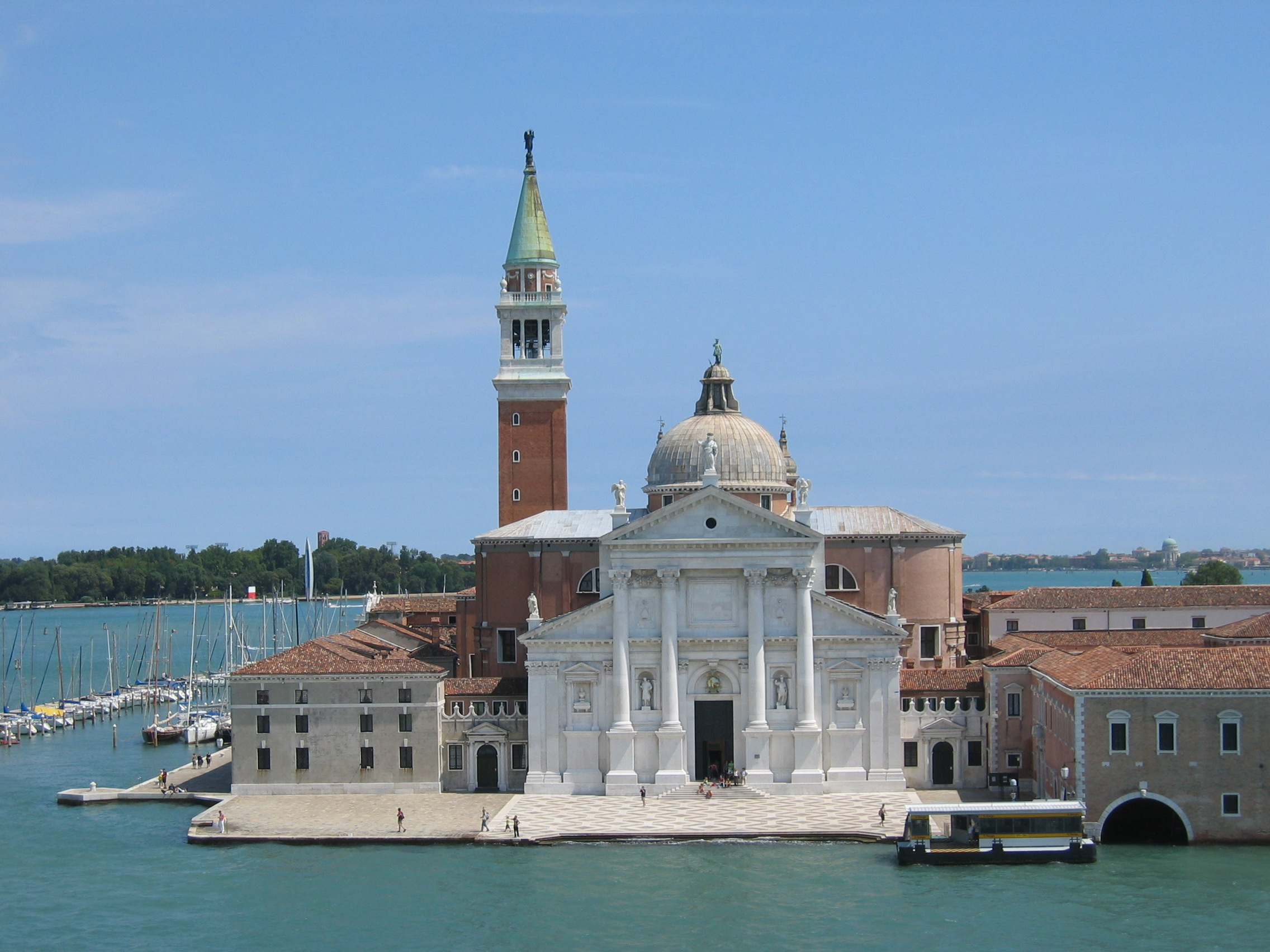 La Basilique de San Giorgio Maggiore à Venise photographie prise en août 2006 par Theudbald